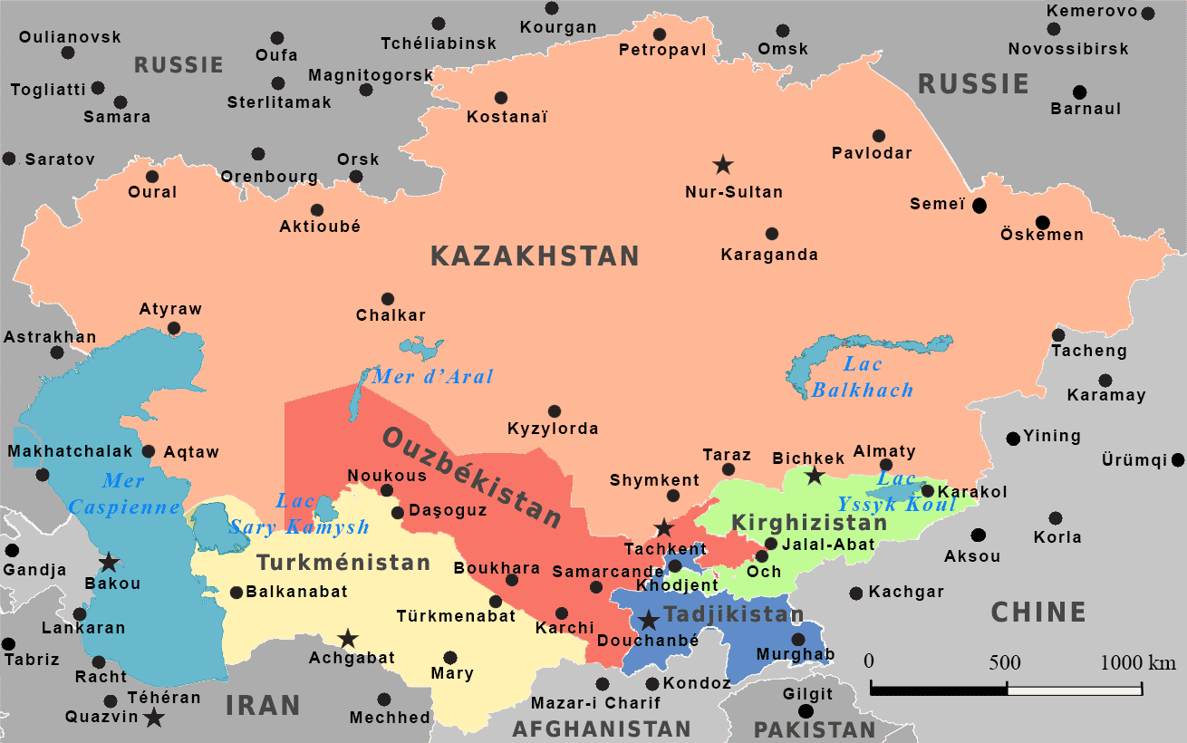 Carte d'Asie centrale. Libellés en français.